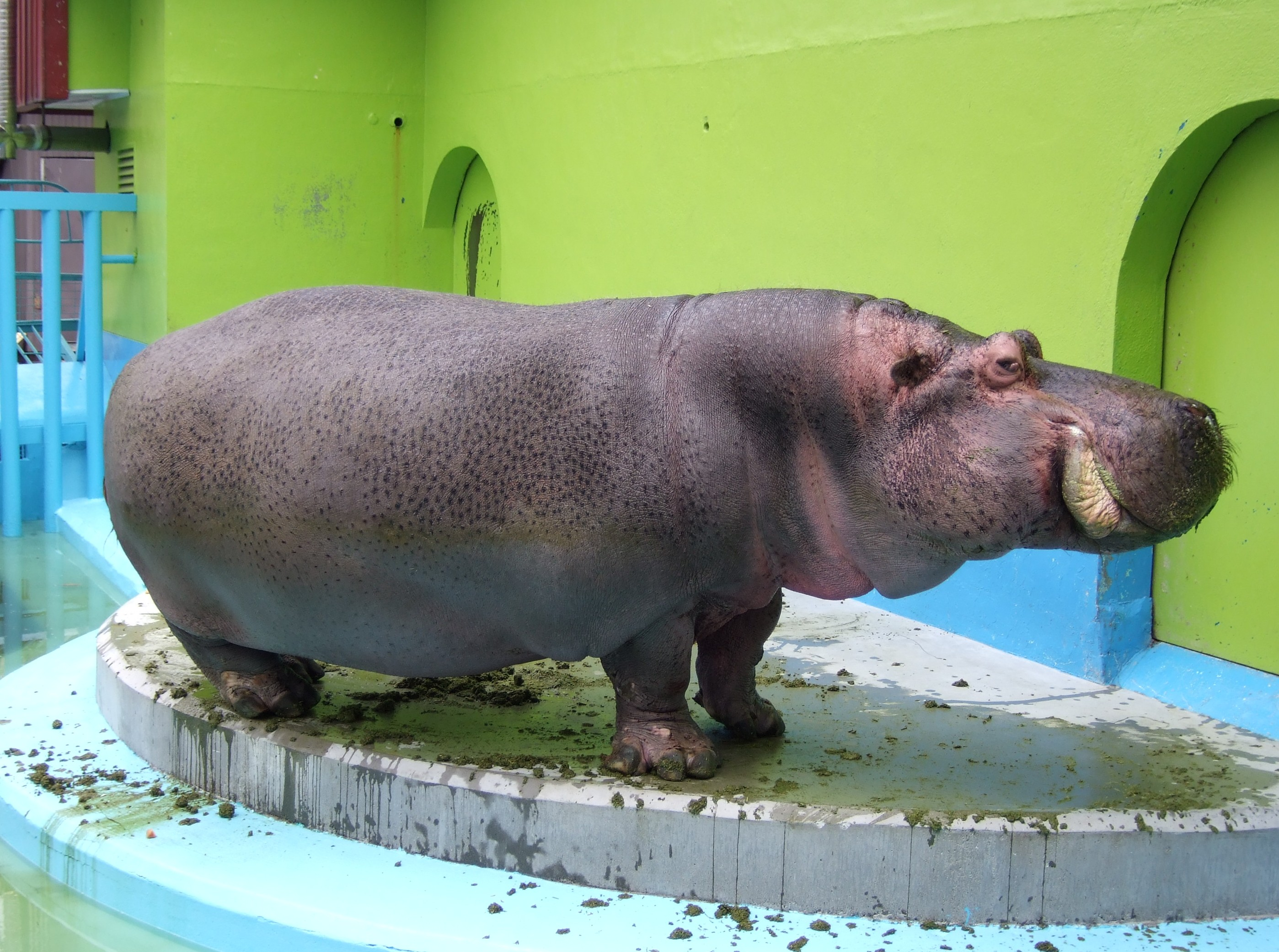 かば。Hippopotamus. 200604 Obihiro Japan.